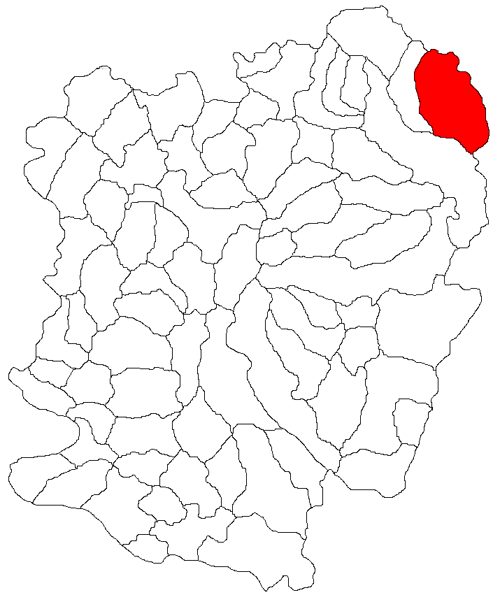 Categorie:Hărţi ale judeţului Caraş-Severin